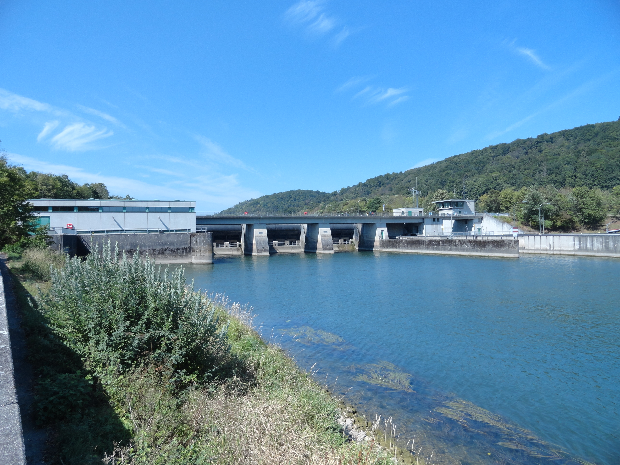 Staustufe Kelheim; Unterwasser